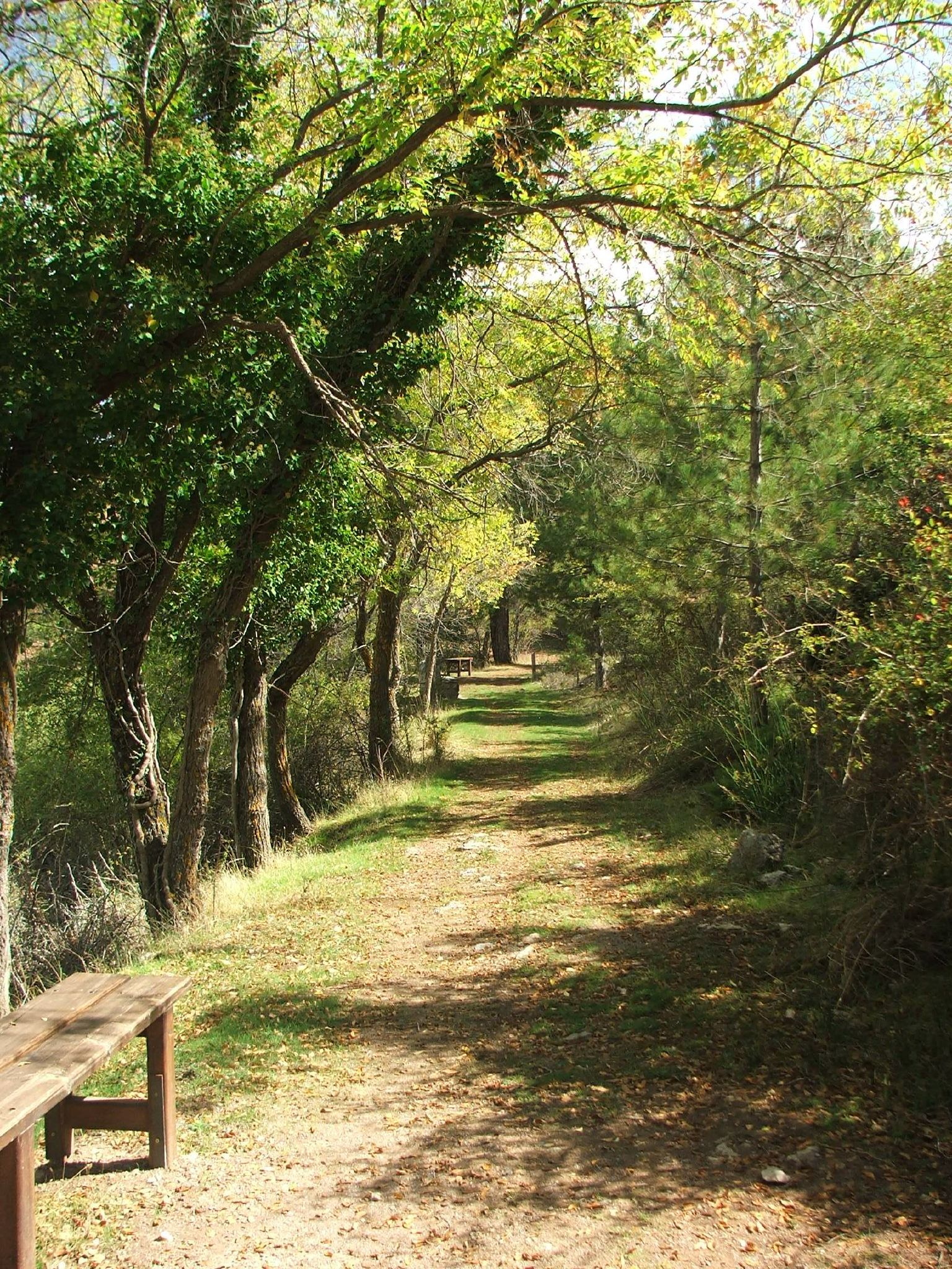 Parque Natural de Sierra de Baza, Granada (España)